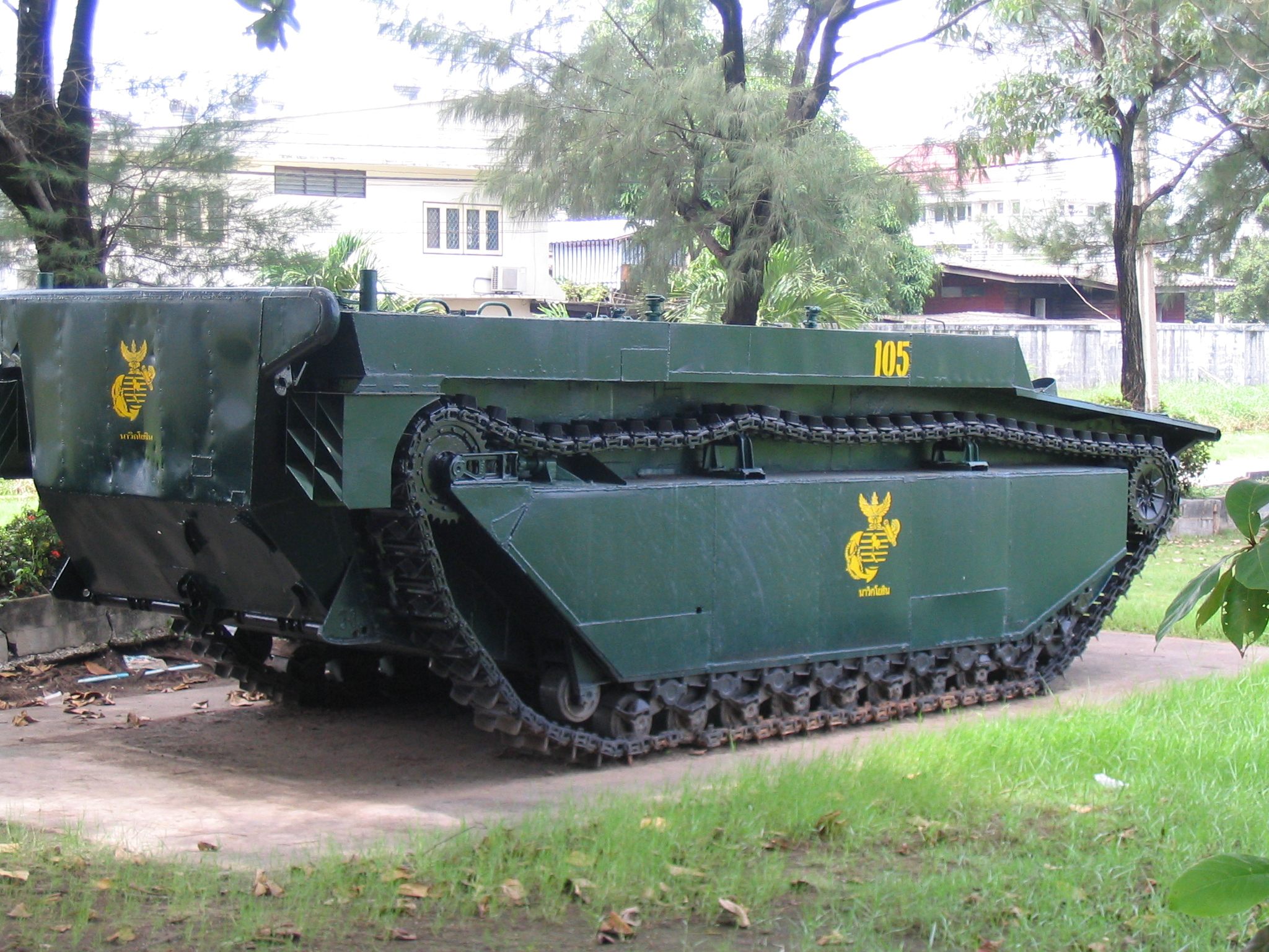 LVT-4 at Naval Museum of Royal Thai Navy, Samut Prakan.